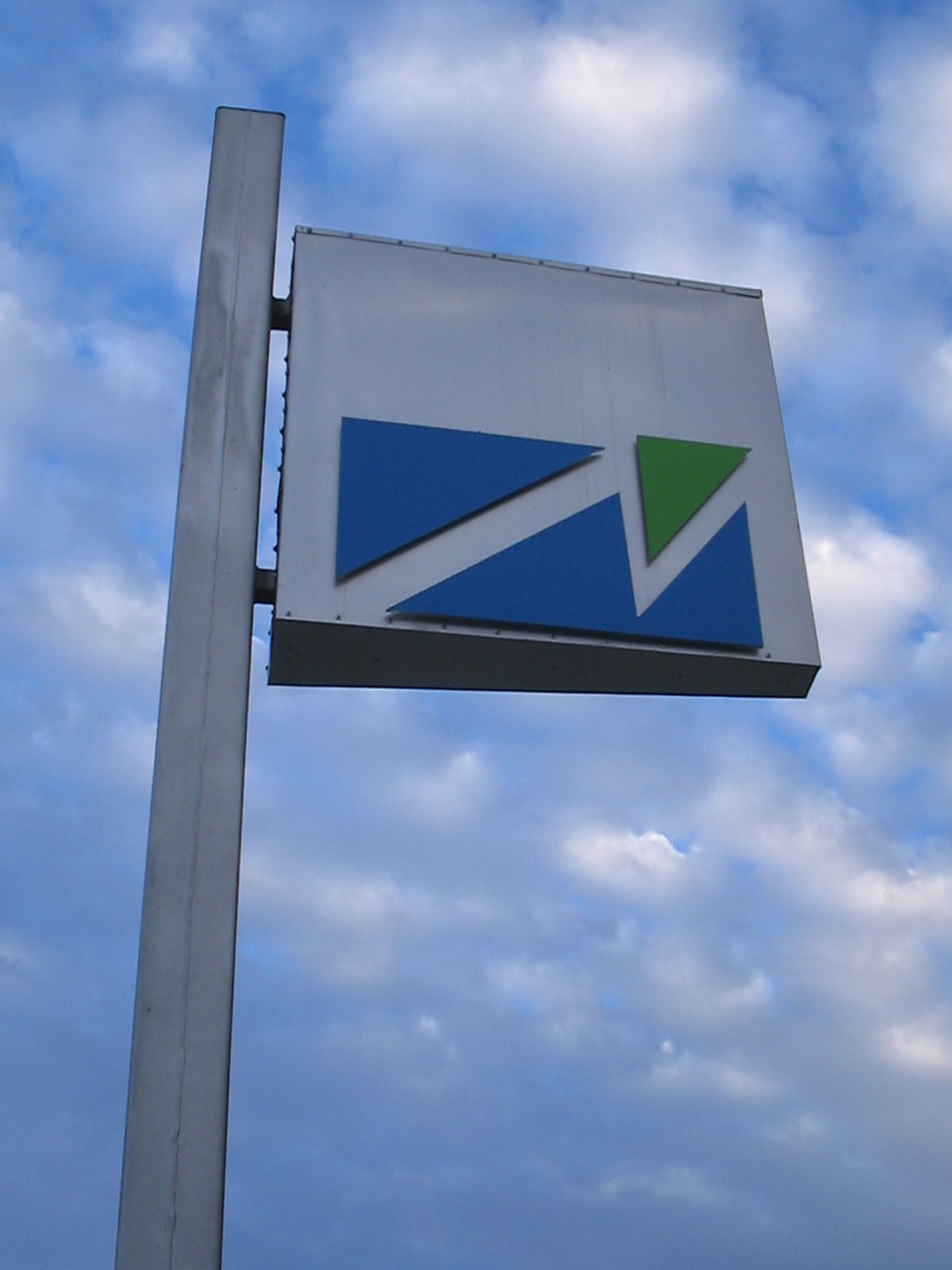 Símbolo del Metro de Valparaíso en la Estación Viña del Mar